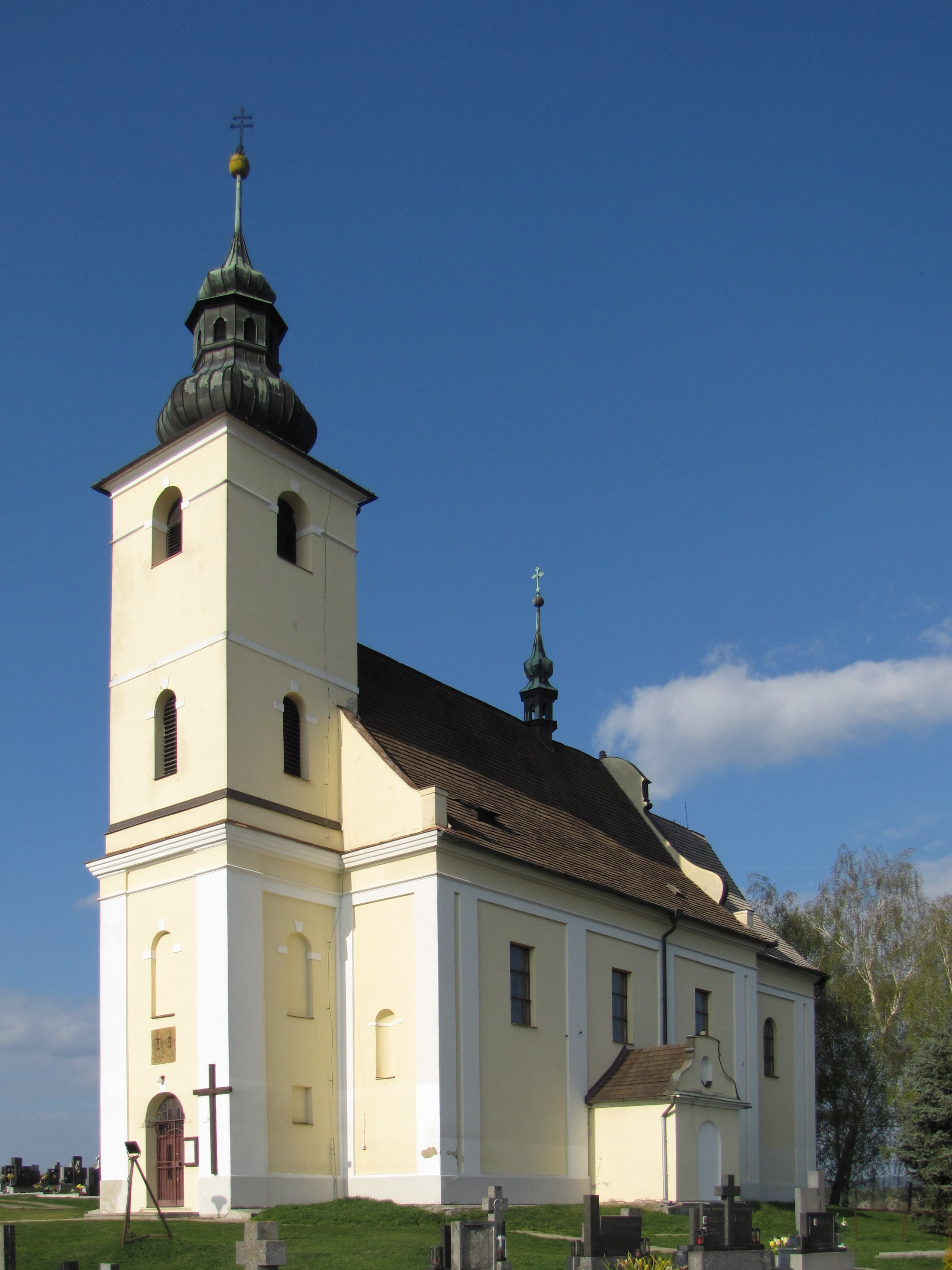 Kostel svatého Jakuba Většího v Ježově, okres Hodonín